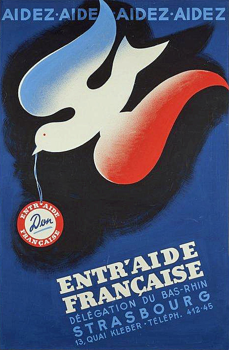 Entr'aide française, délégation du Bas-Rhin, Strasbourg, 13 quai Kléber ... : aidez, aidez, aidez, aidez : [maquette d'affiche]. Bibliothèque nationale et universitaire de Strasbourg